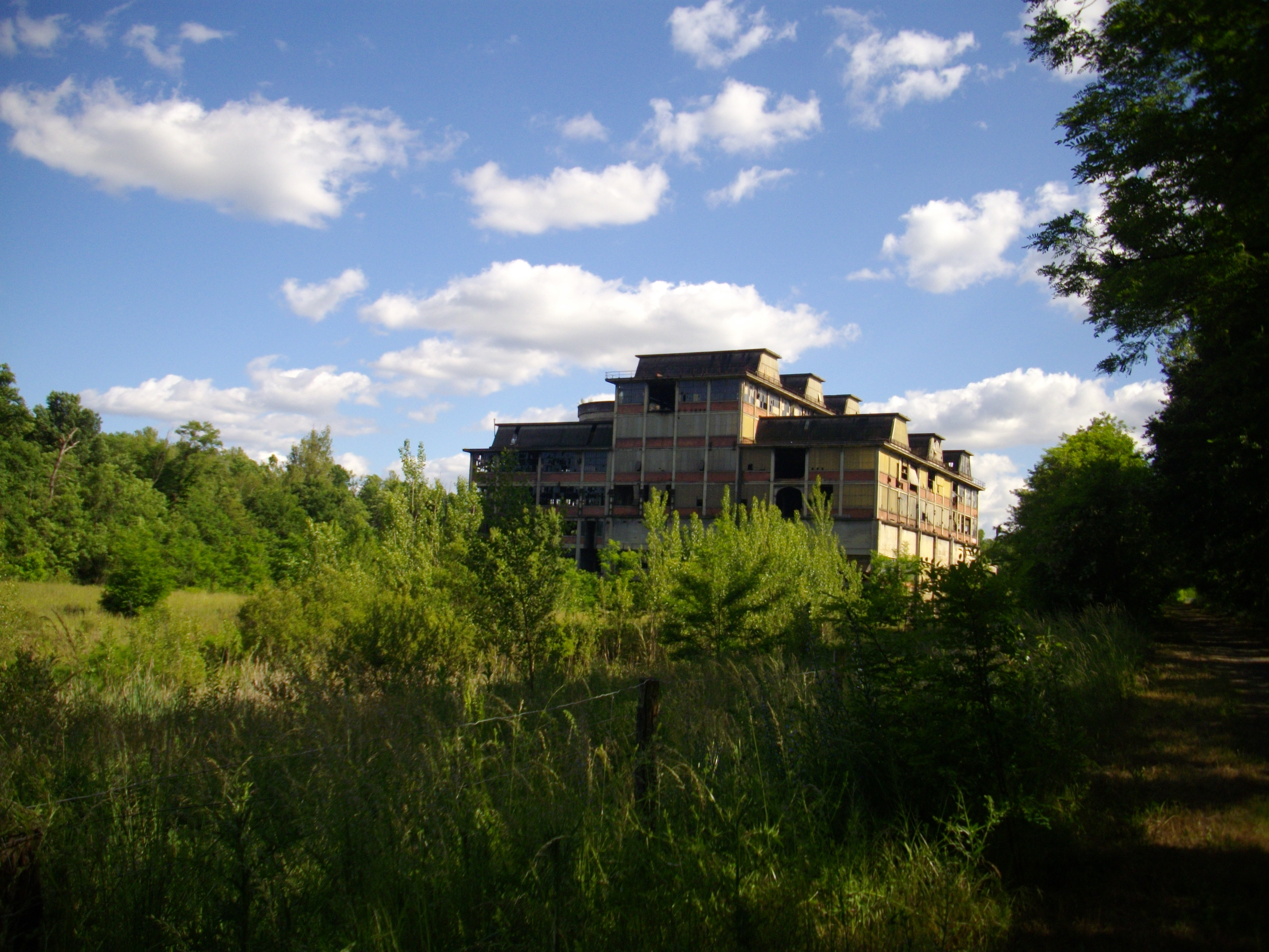 Ancien lavoir à charbon, aujourd'hui en friches